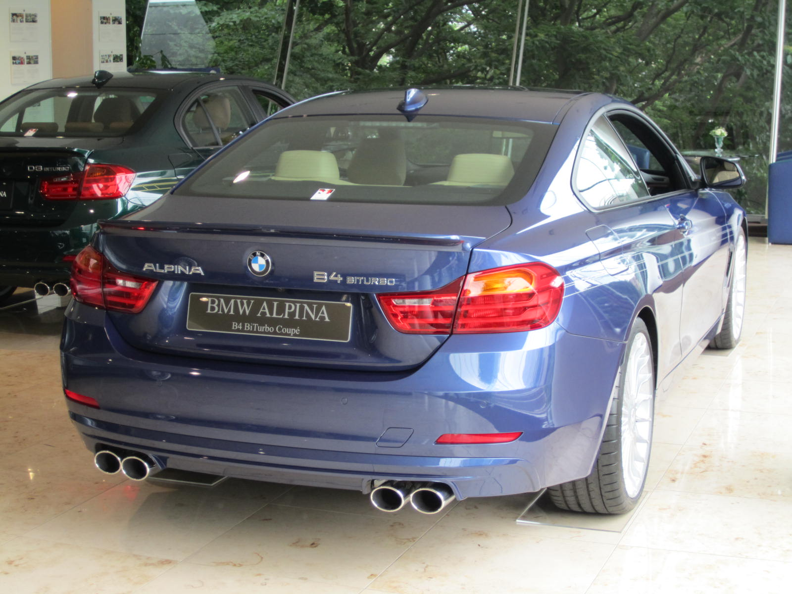 B4クーペリア